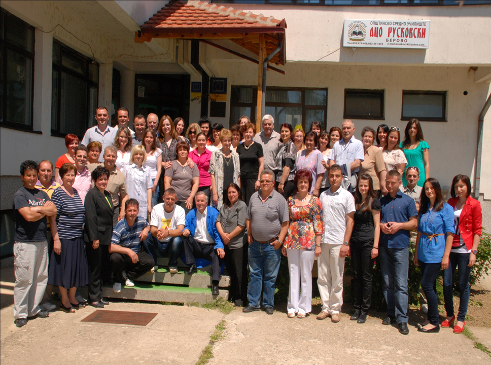 Наставниот кадар на училиштето